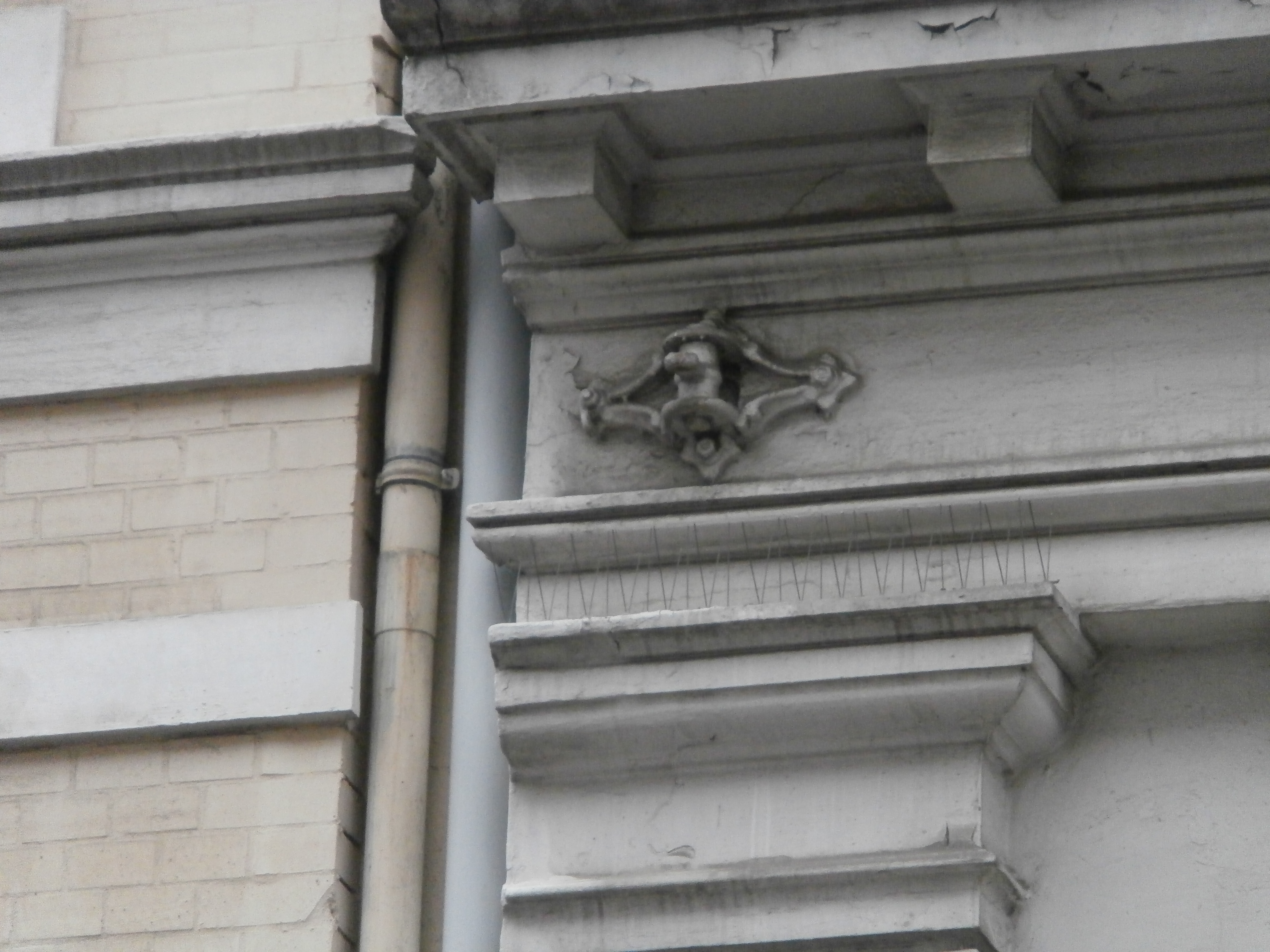 Oberleitungsrosette der Hamburg-Altonaer Centralbahn-Gesellschaft in Hamburg-Ottensen.